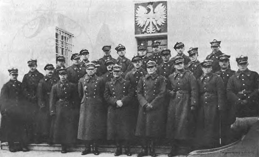 Oficerowie Wołyńskiej Szkoły Podchorążych Rezerwy Artylerii przed 1934. Na zdjęciu m.in. ppłk Jan Filipowicz, mjr Karol Galster, mjr Józef Pyrek